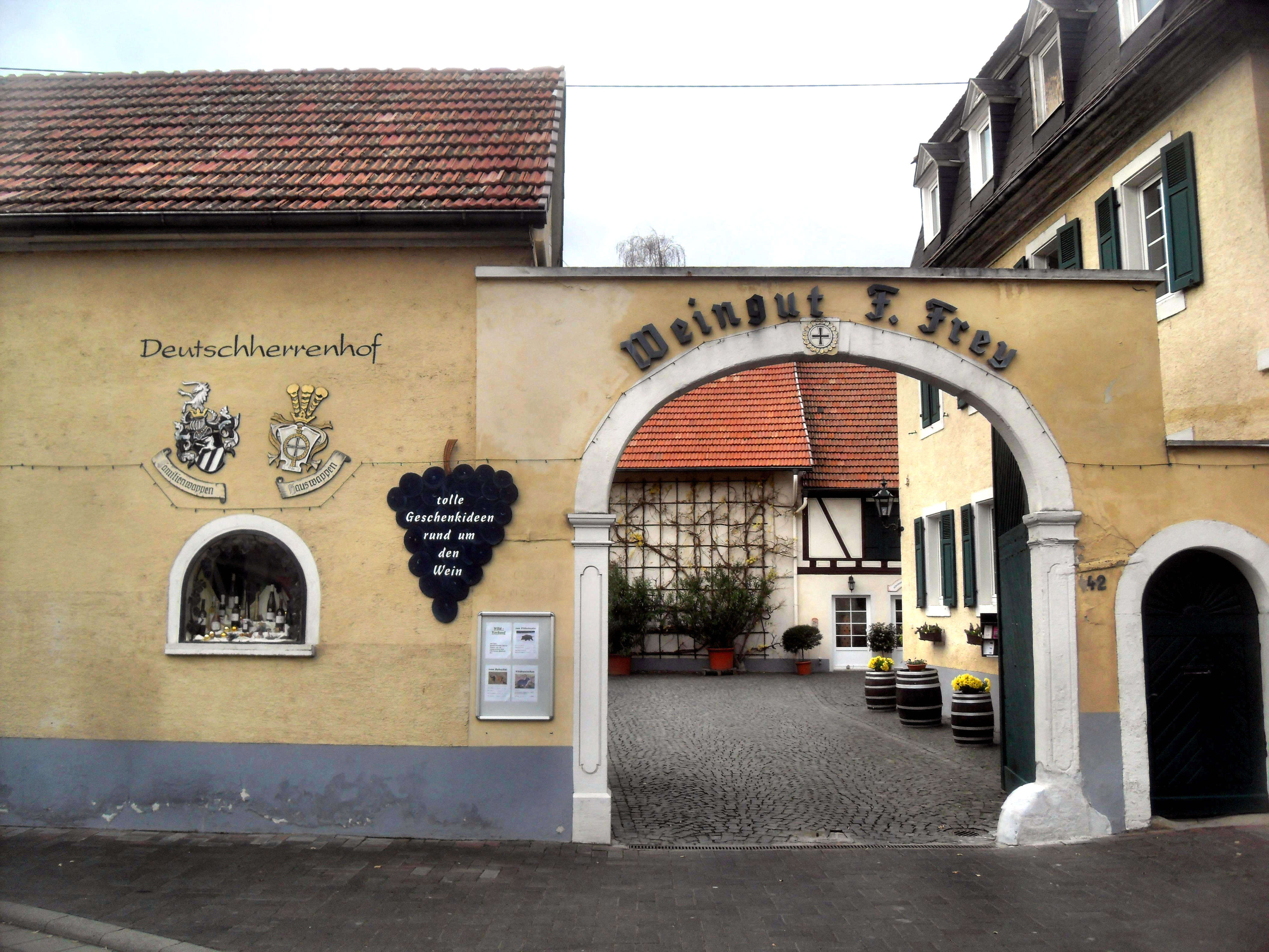 Dier Haupteinfahrt des Deutschherrenhofs (Weingut Frey) in Guntersblum in Rheinhessen (Deutschland)